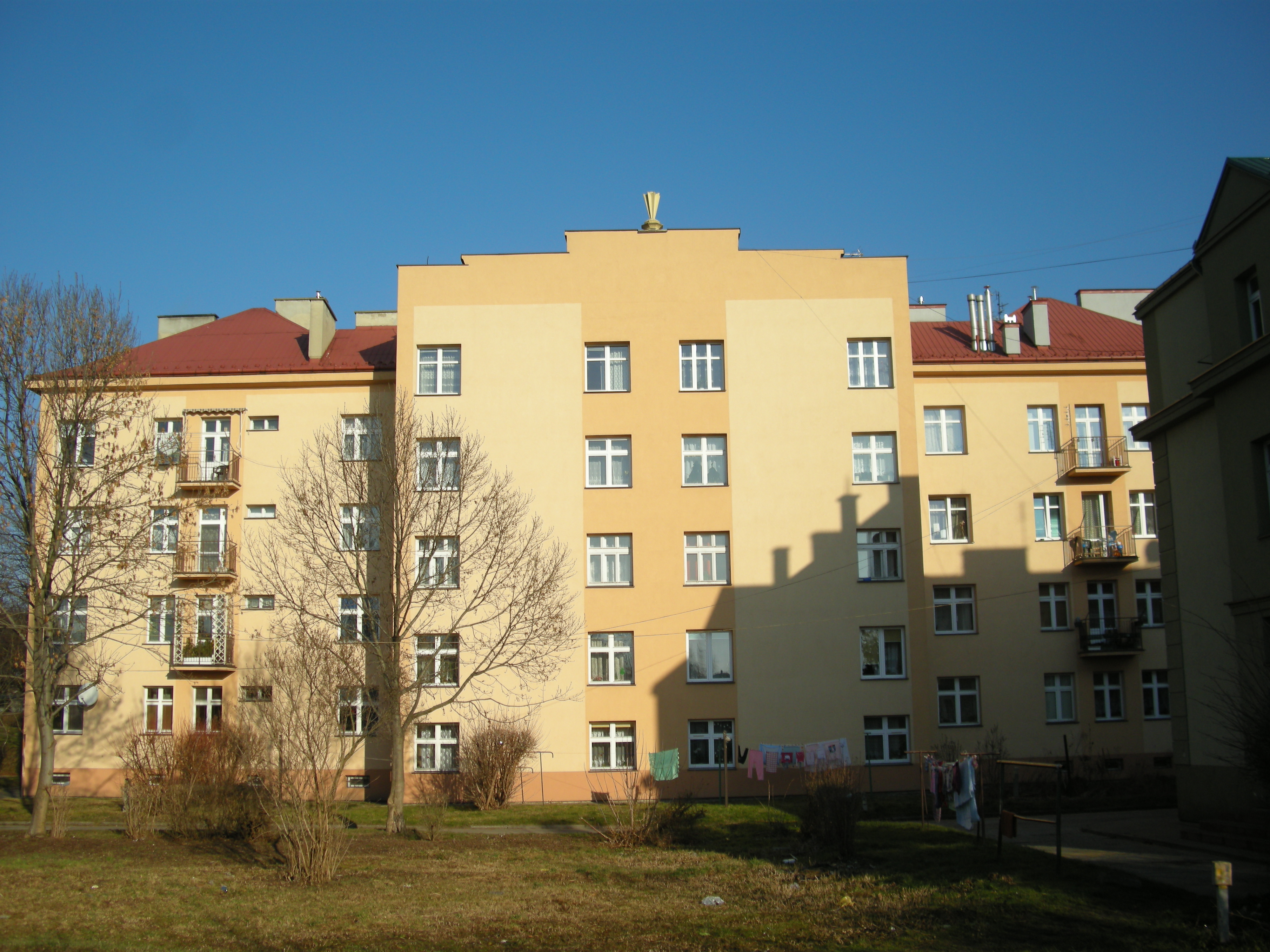 Czynszowy dom miejski z 1930 r. przy ul. Dwernickiego